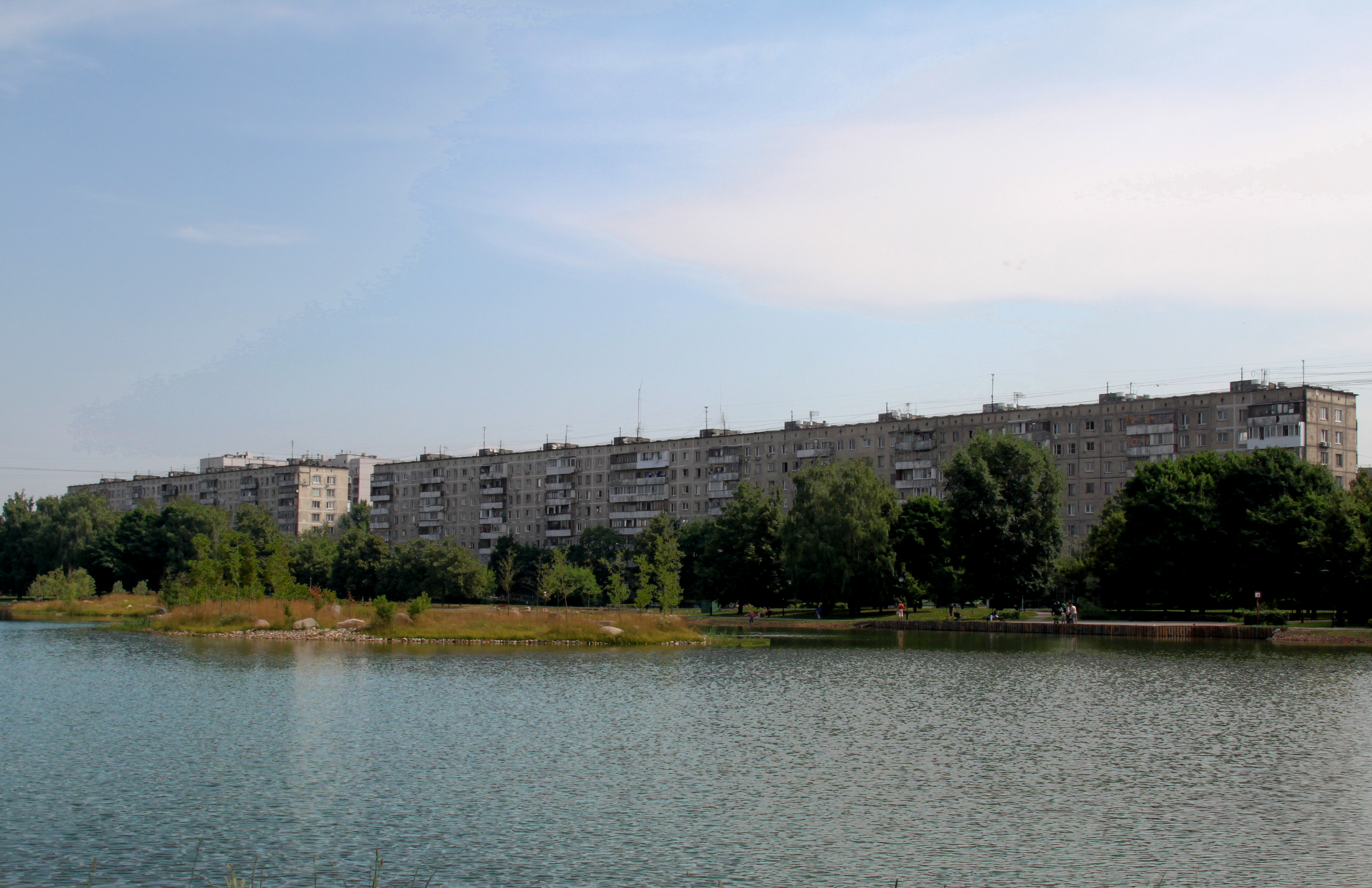 Дома на улице Софьи Ковалевской. Вид от Ангарских прудов